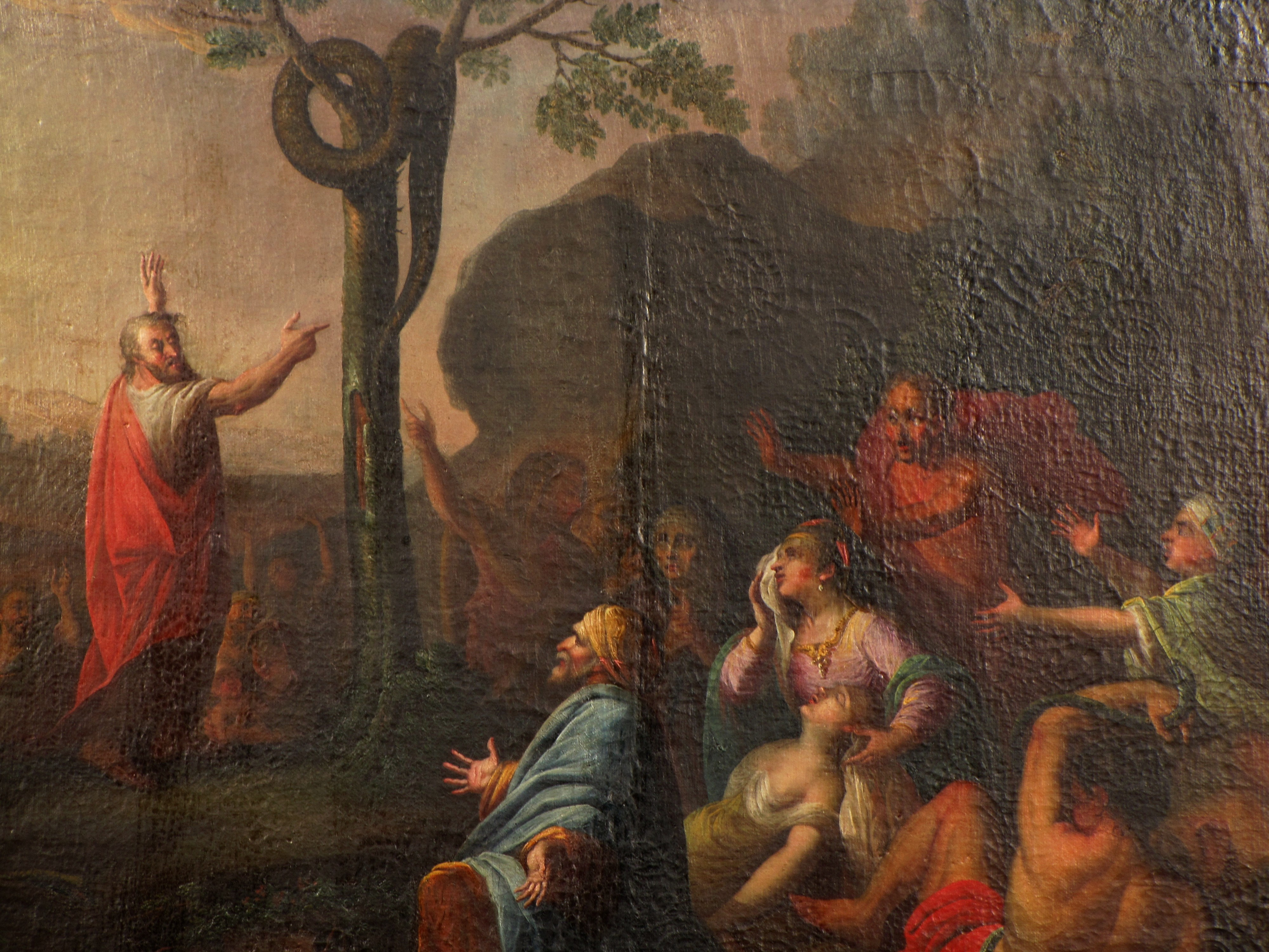 Alsace, Bas-Rhin, Wiwersheim, Église Saint-Cyriaque (IA67001024). Tableau "Moïse et le serpent d'airain" (Joseph MELLING, huile sur toile, 150cm de large, XVIIIe): This object is classé Monument Historique in the base Palissy, database of the French furniture patrimony of the French ministry of culture, under the references PM67000474 and IM67010026.